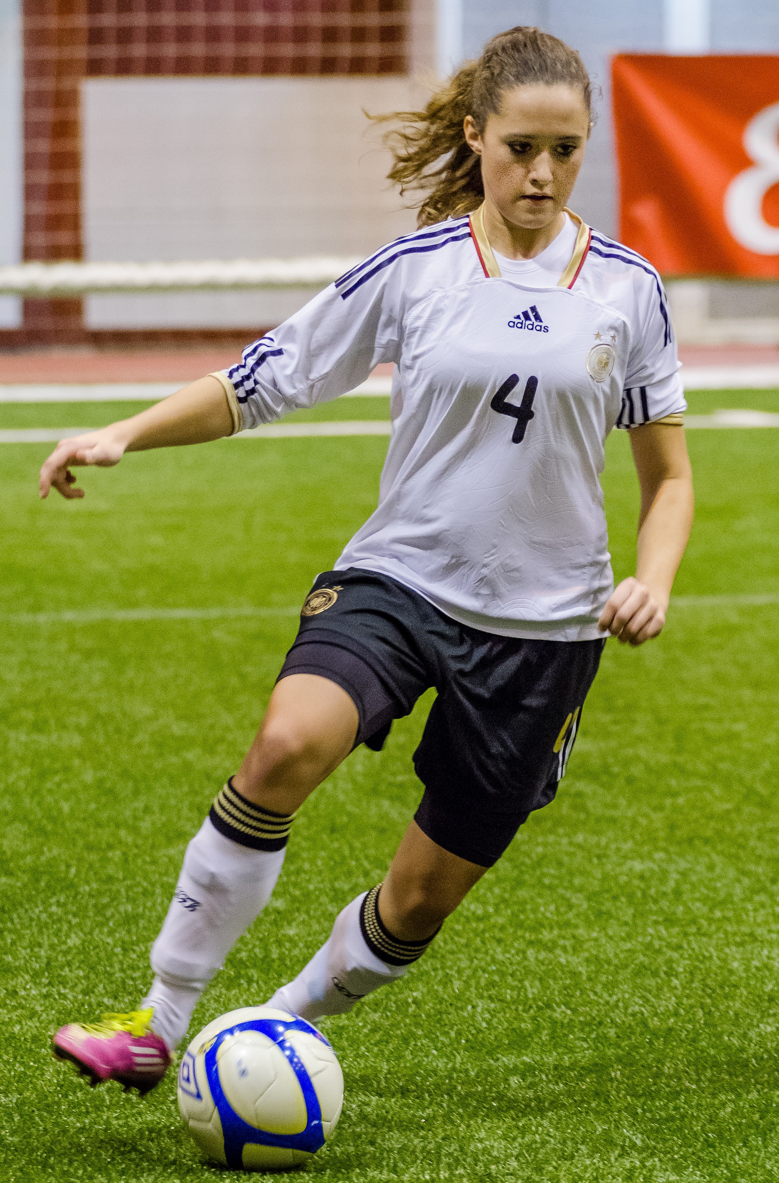 Franziska Jaser spelar F18-landskamp mellan Sverige och Tyskland i Växjö Tipshall, 21/11 2012.